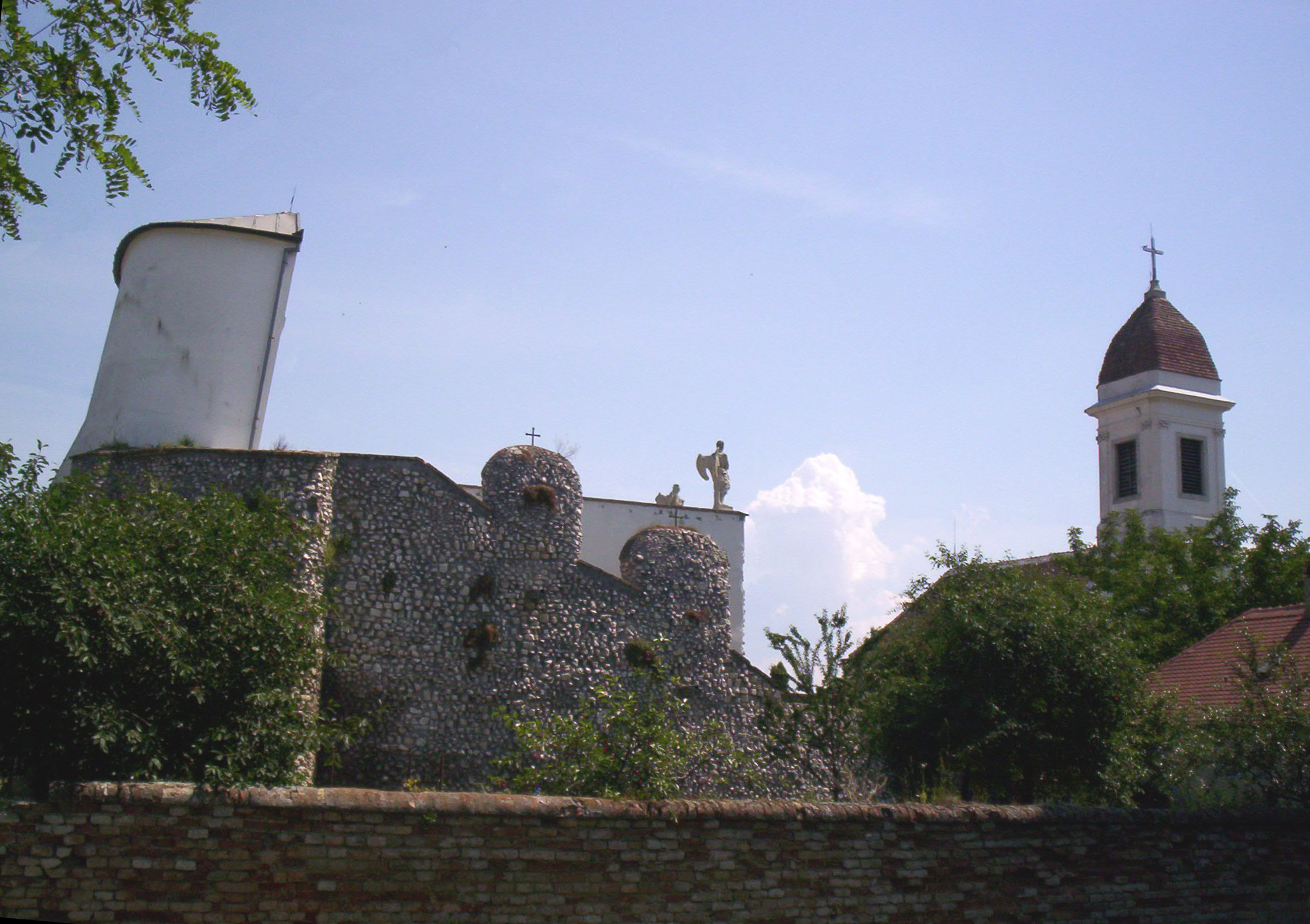 The Calvary Church and the Golgota in Pápa, Hungary (wires removed by photo editor) A pápai Kálvária-templom és a Golgota (a villanydrótok képszerkesztővel eltüntetve)